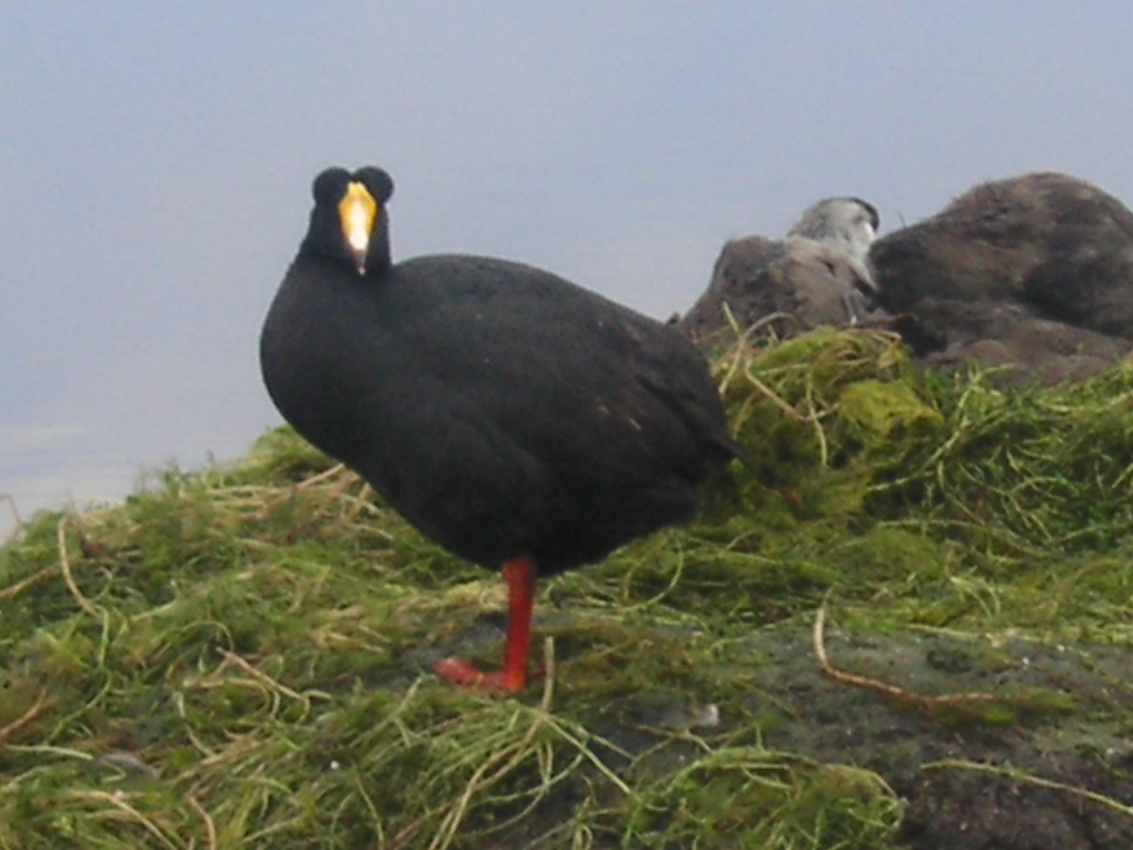 Fulica gigantea (Bofedales de Parinacota, near Chungara Lake, Chile)